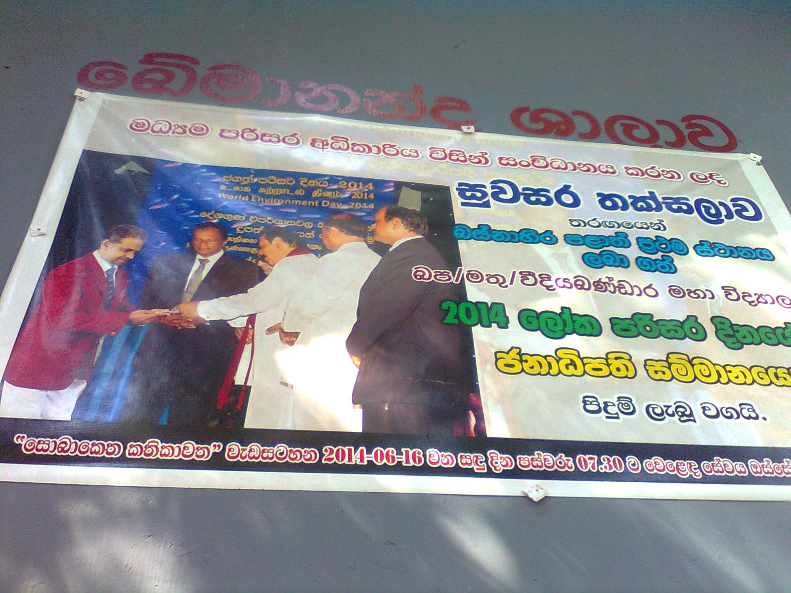 සිංහල: පර්සි මහේන්ද්ර(මහින්ද)රාජපක්ෂ මහතා අතින් සම්මානය ලබා ගැනීම